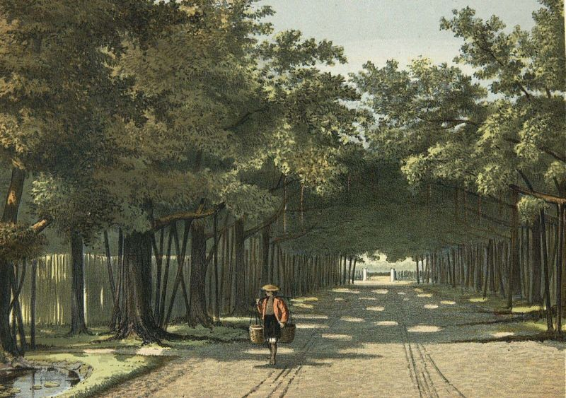 Litho. Litho naar een oorspronkelijke aquarel van J.C. Rappard.. Een waringinlaan in de plantentuin van Buitenzorg